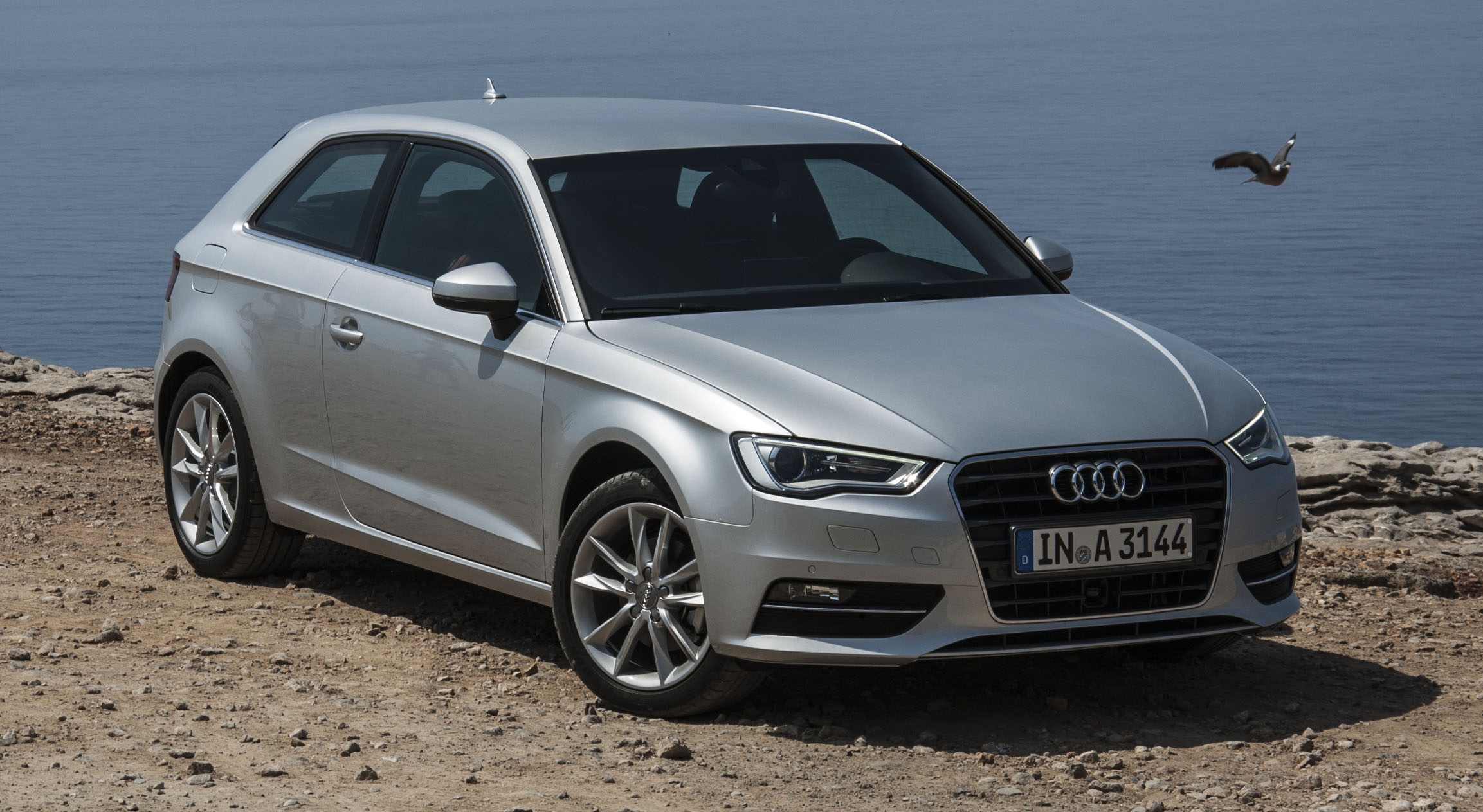 Nuevo Audi A3 en Mallorca. Test Drive del Audi A3